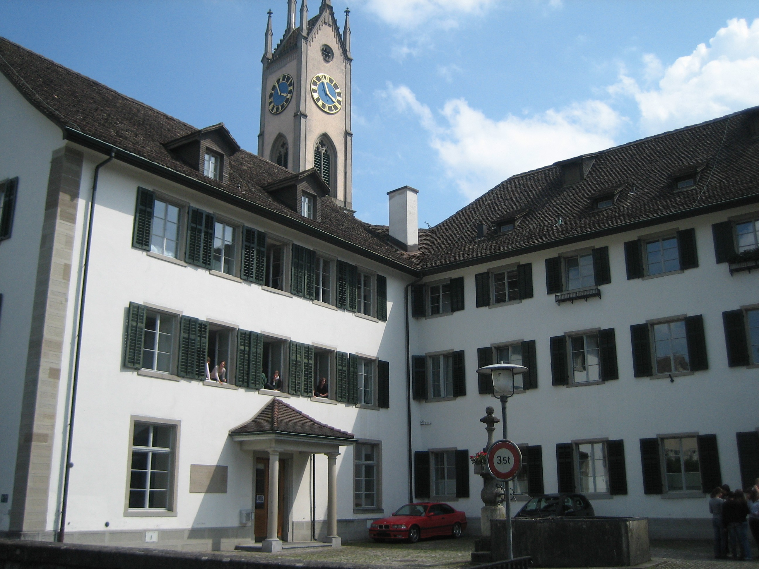 Kantonsschule Küsnacht, alter Trakt